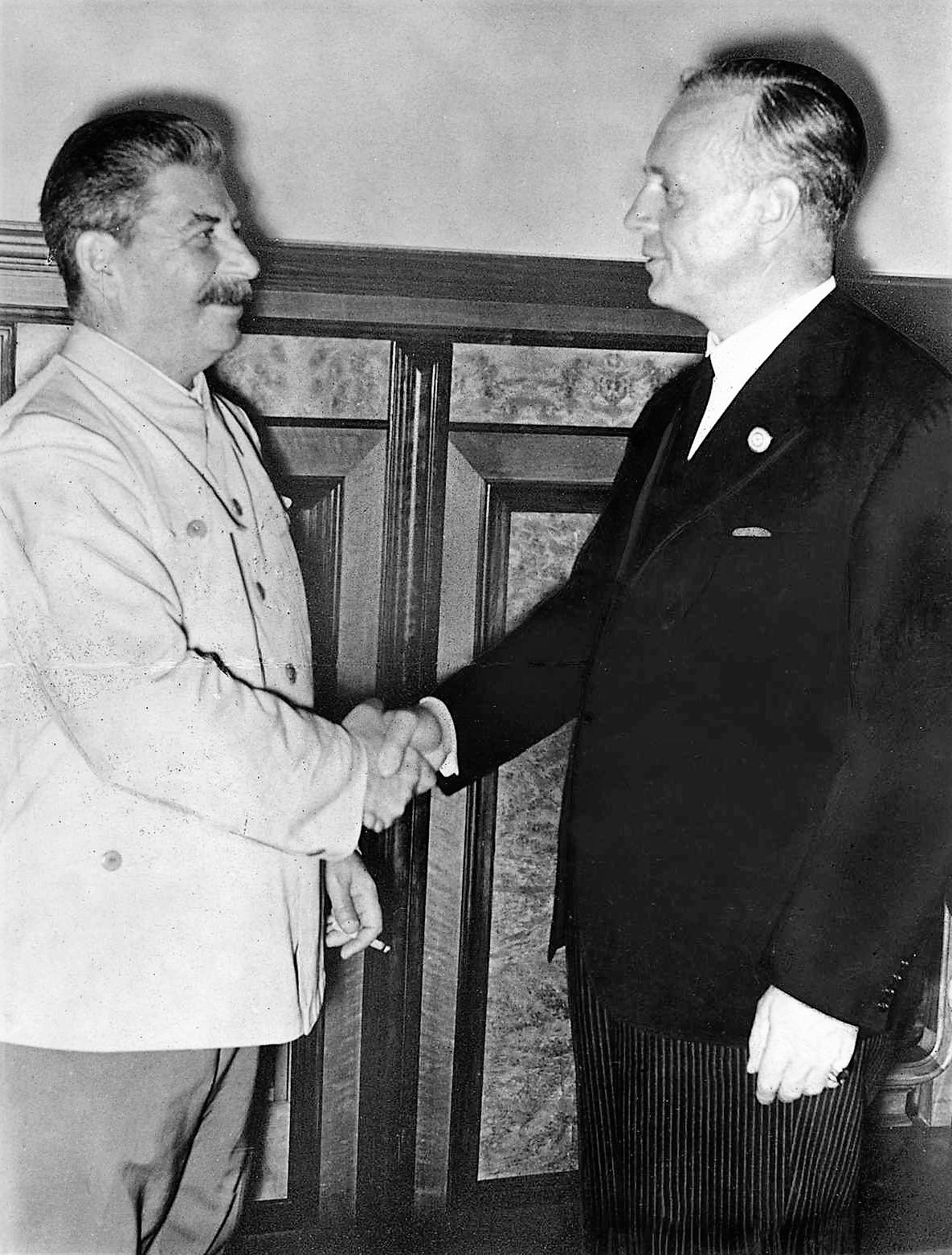 ADN-ZB/Archiv Sowjetunion, August 1939, Im Moskauer Kreml wird am 23.8.1939 ein Nichtangriffsvertrag zwischen dem deutschen Reich und der UdSSR unterzeichnet. Nach der Unterzeichnung im Gespräch J.W. Stalin und der deutsche Reichsaußenminister Joachim von Ribbentrop (r.).